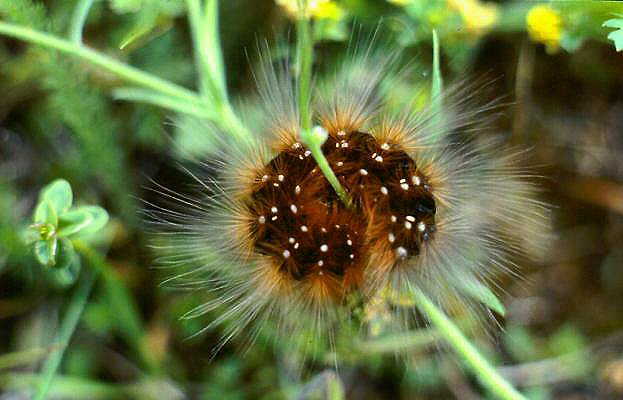 Um einen Blattstengel gerollte Raupe des Braunen Bären (Arctia caja).